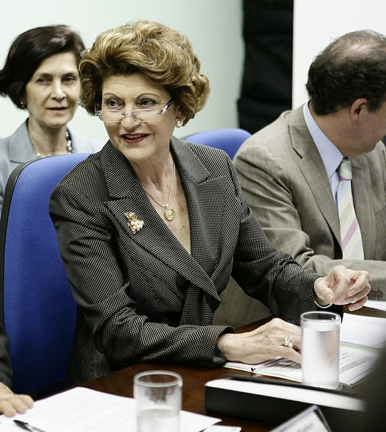 Sra. Androulla Vassiliou - Comissária Europeia para Educação e Cultura